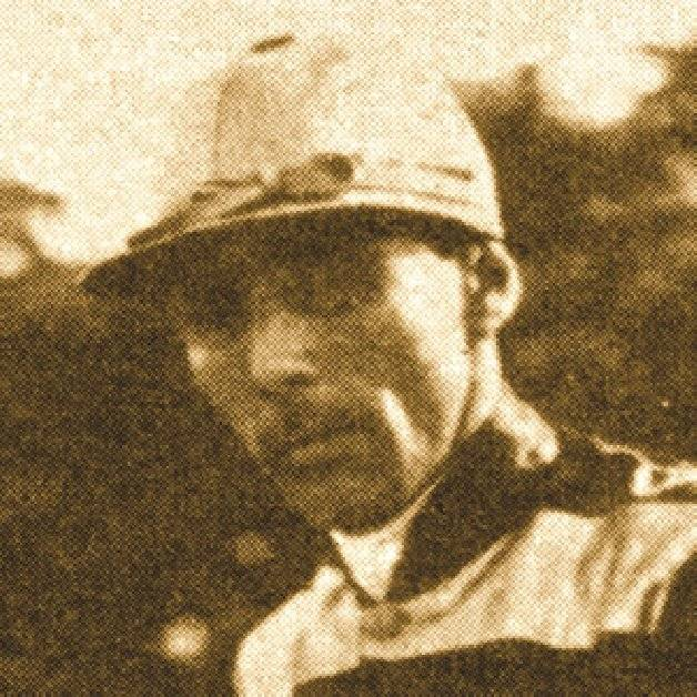 Jockey argentino Elías "Yacaré" Antúnez